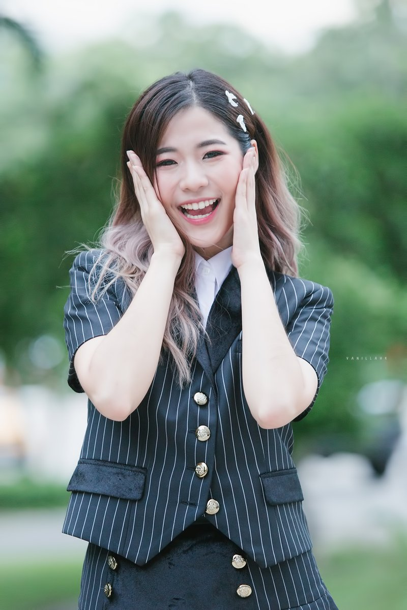 น้ำ กัญญ์กุลณัช ปัญญากิตตินันท์